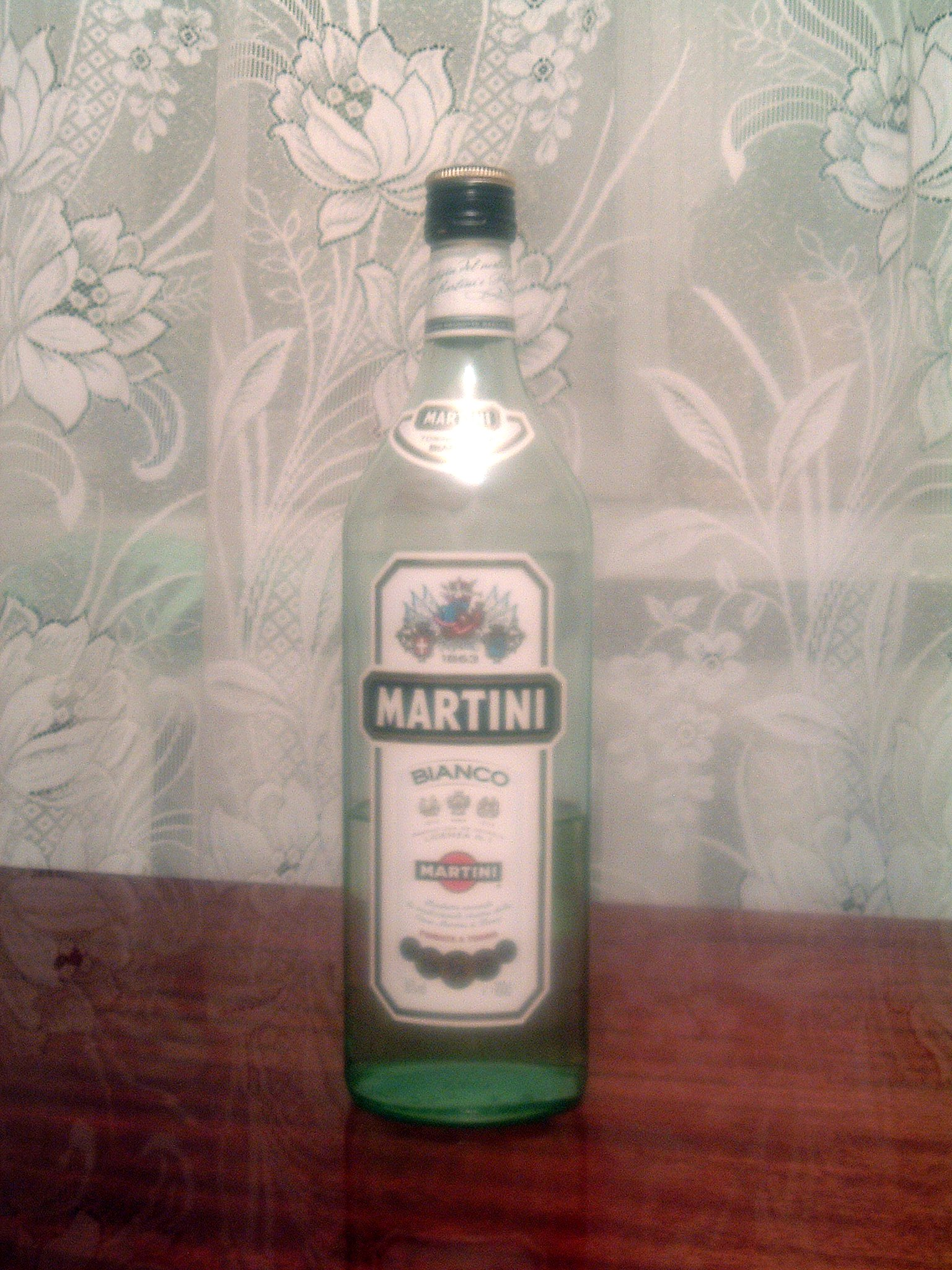 Martini Bianko, 1L